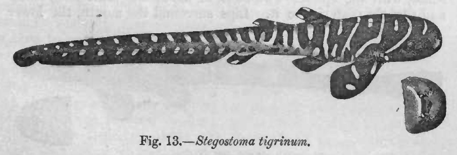 Stegostoma tigrinum = Stegostoma fasciatum (Hermann, 1783)